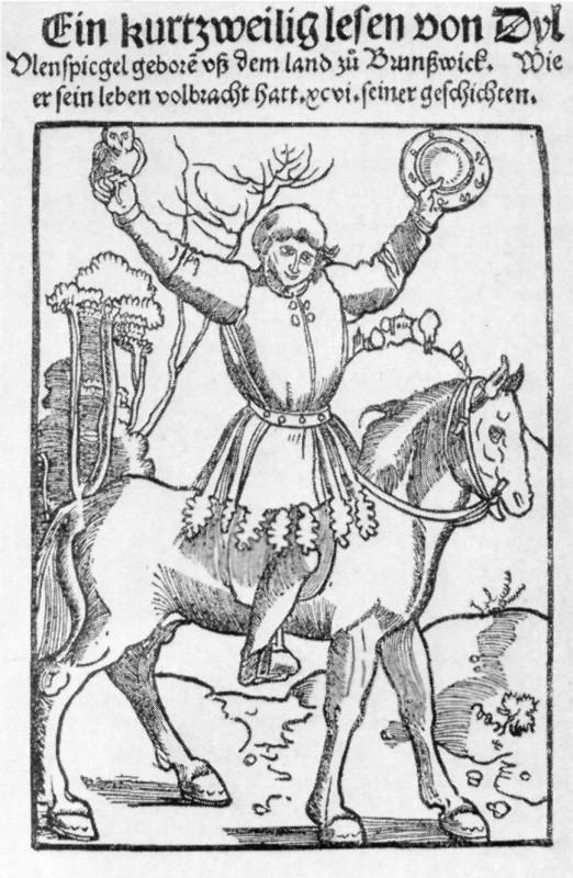 Titelblatt: Ein kurtzweilig lesen von Dyl Ulenspiegel gebore vß dem land zu Brunßwick : wie er sein leben volbracht hatt ; XCVI seiner geschichten - Hans Baldung Grien (?), Titelseite der Ausg. Straßburg 1515. Holzschnitt, 12,3 × 8,9 cm